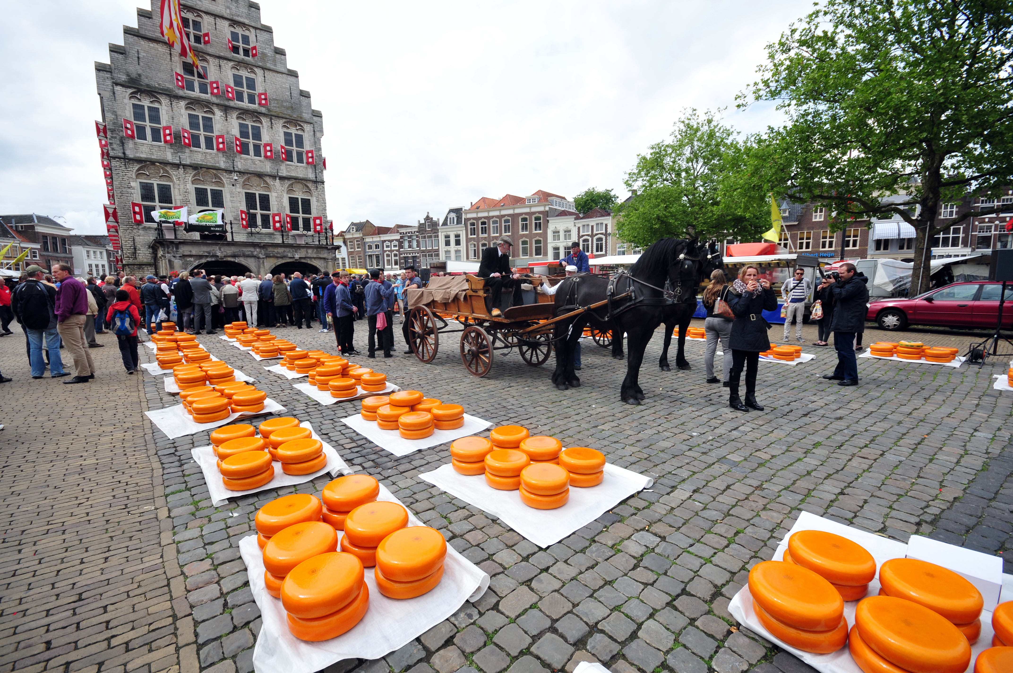 Gouda, Niederlande, Stadtzentrum